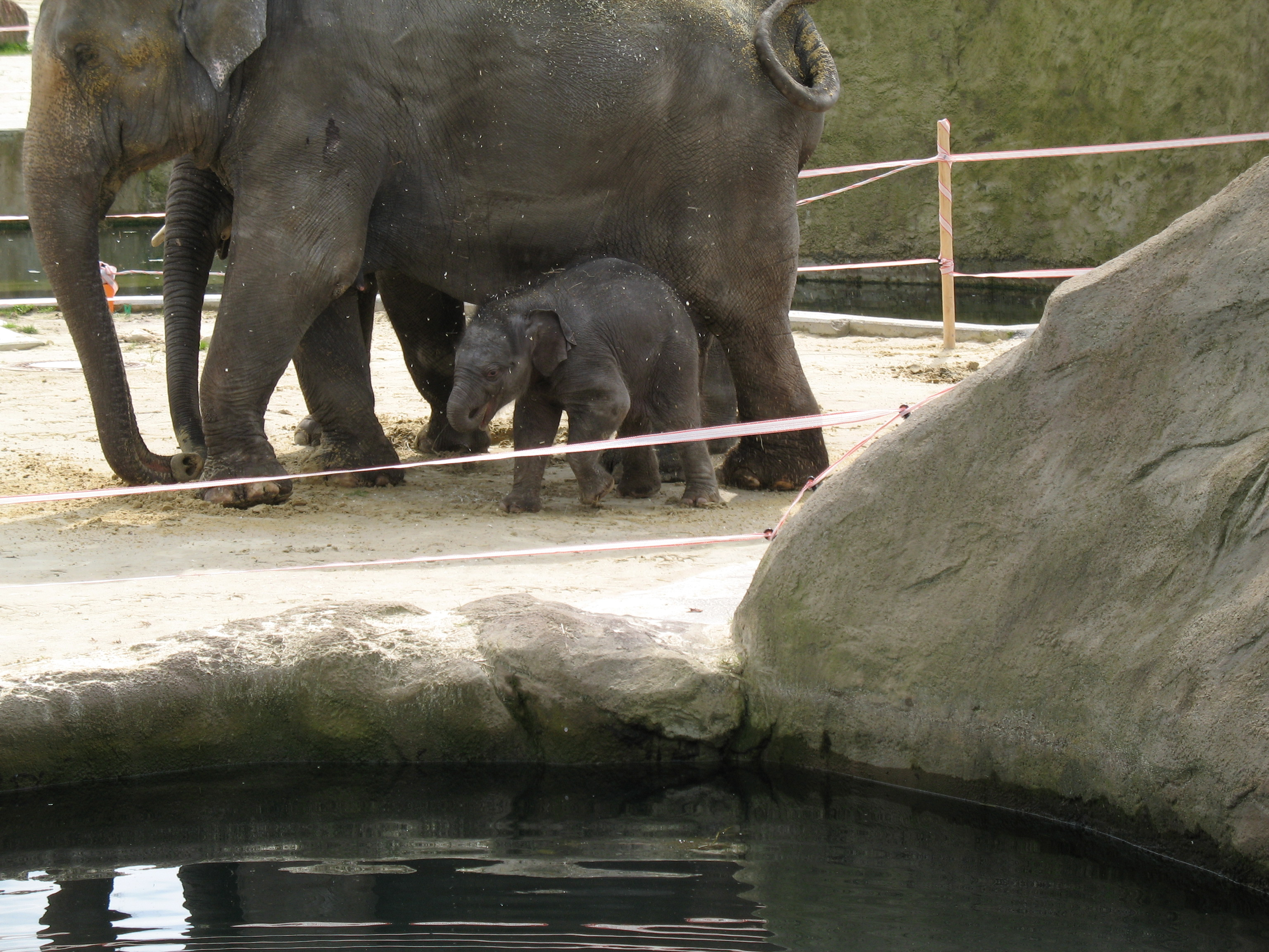 Elefantenkind Marlar ("Blüte") aus dem Kölner Zoo / Elephant baby Marlar ("Blossom") of Cologne Zoo